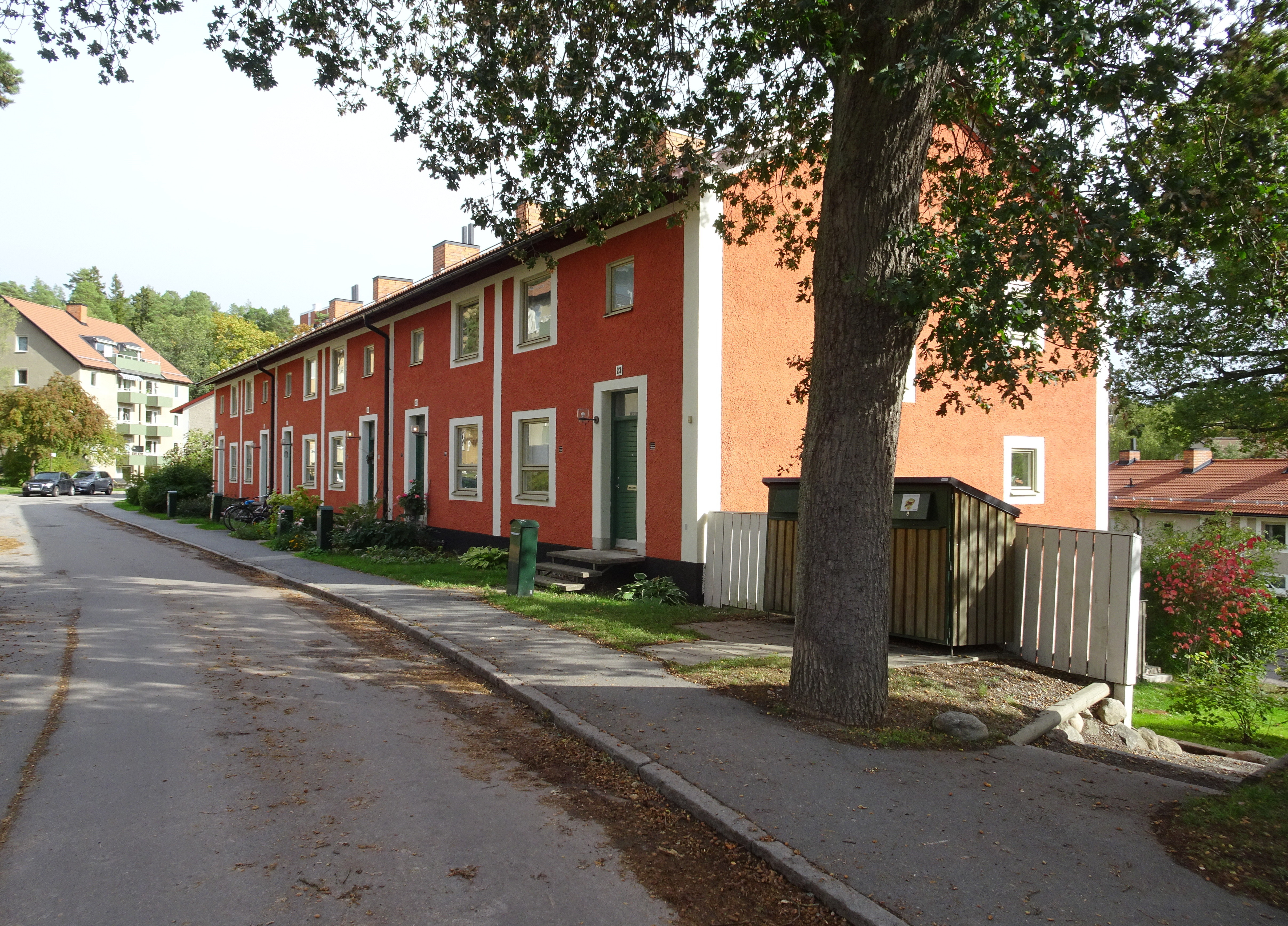 Bostadsområdet vid Rastvägen, Nockebyhov, arkitekt Ancker-Gate-Lindegren, 1948